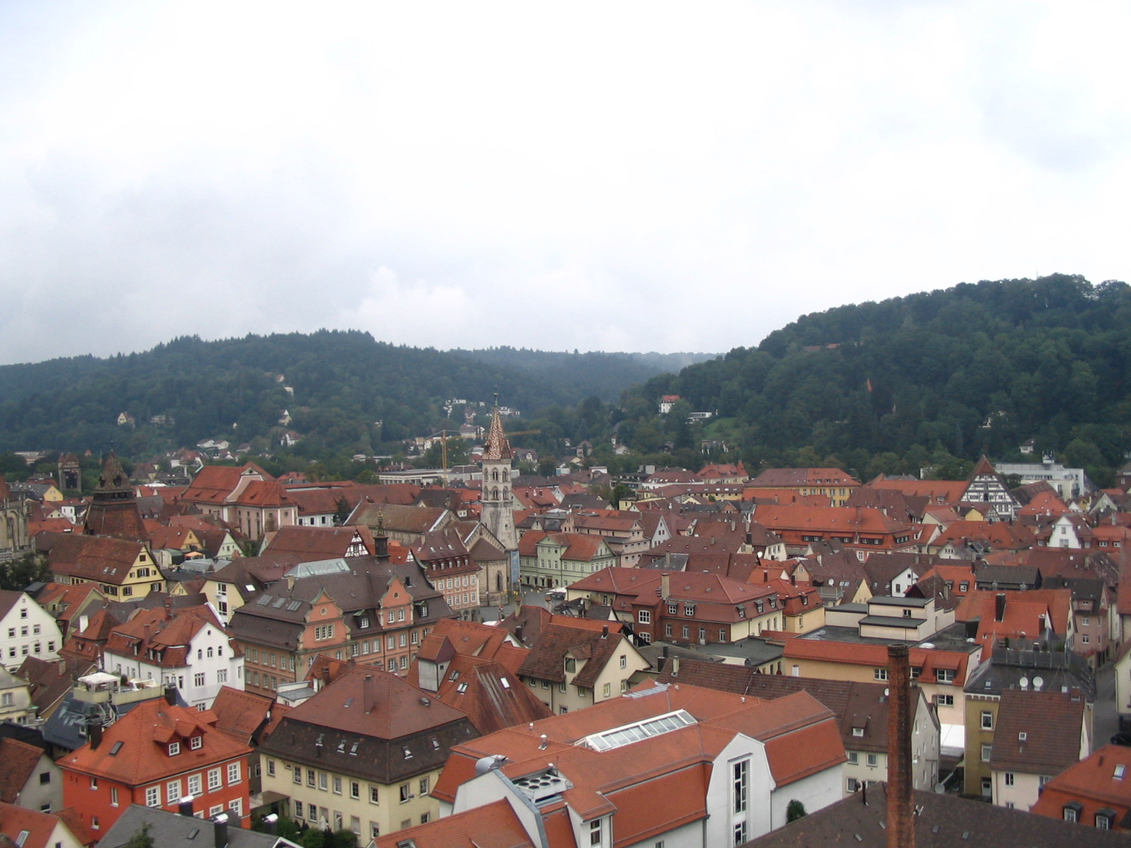 Schwäbisch Gmünd - Blick vom Königsturm in Richtung Marktplatz und Johanneskirche.